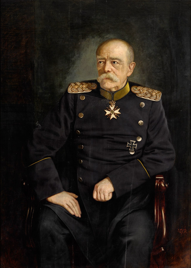 Portrait Otto von Bismarck. Signiert. Datiert (18) 94. Öl auf Leinwand/Platte